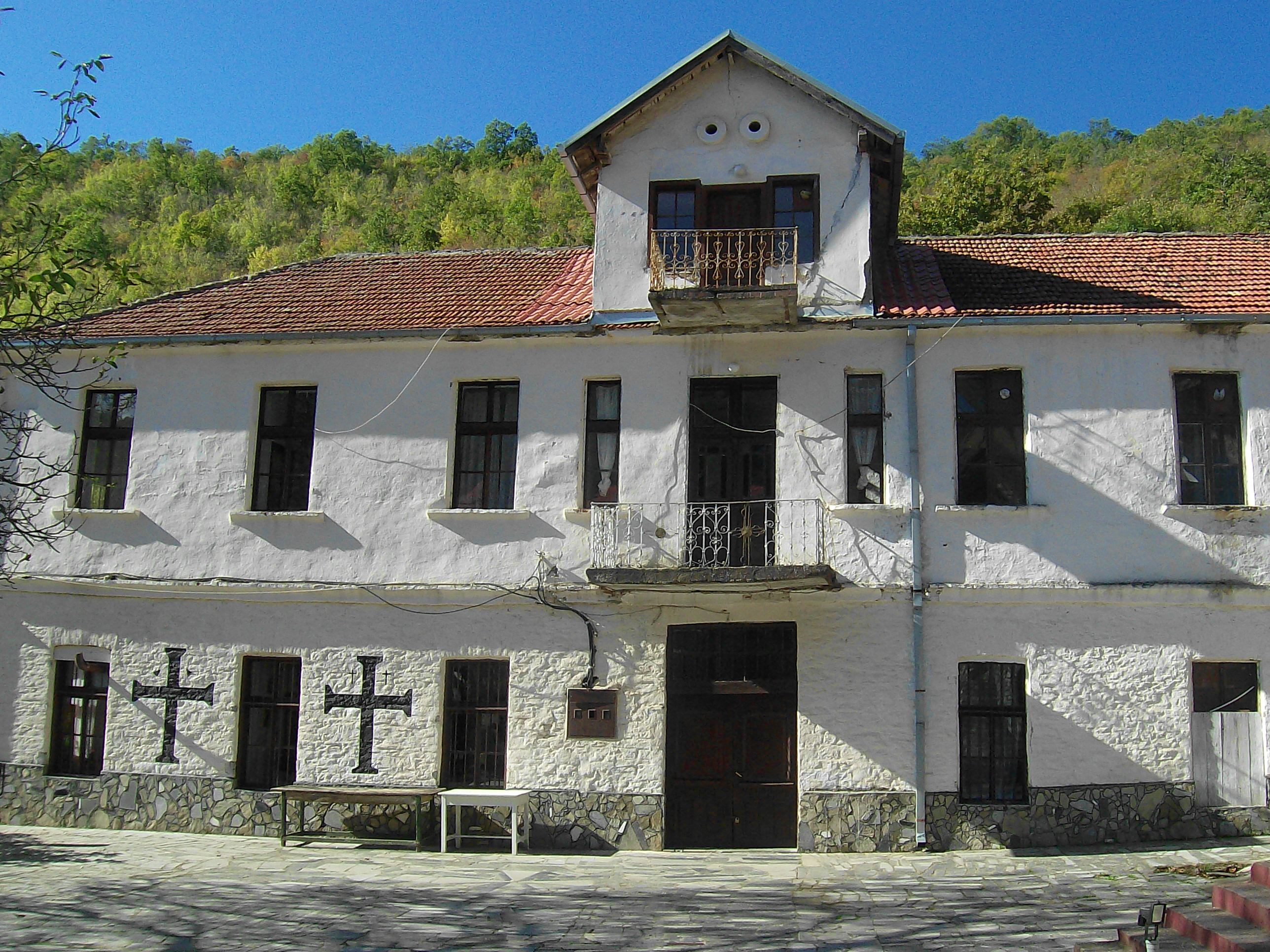 Manastir Sv.Bogorodica- Pobozje, konak